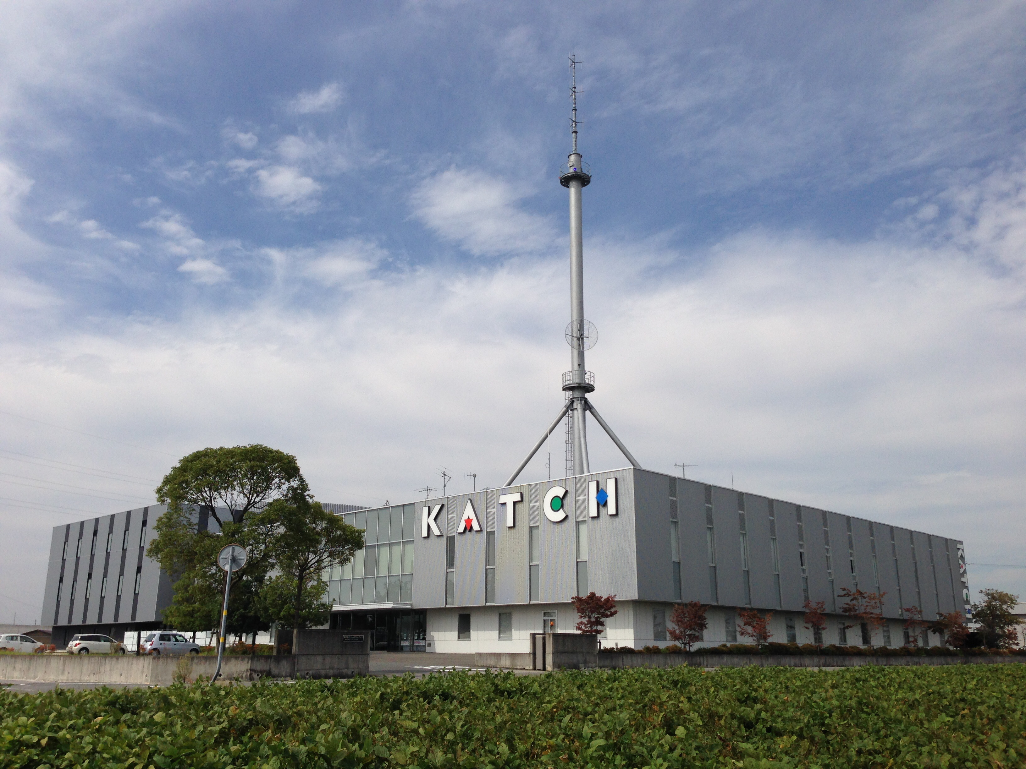 キャッチネットワークの社屋外観